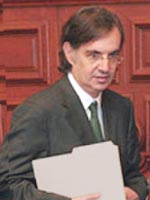 Jose Woldenberg